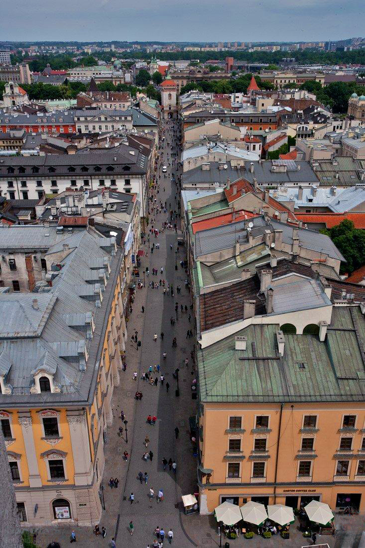 Ulica Floriańska od Rynku Głównego w kierunku Bramy Floriańskiej. Wyjątkowo mało ludzi widać, po południu trudno tam przejść.